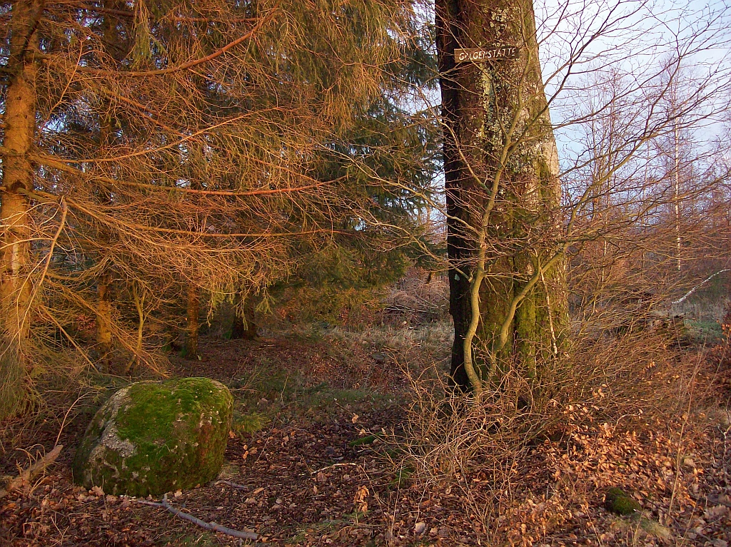 Galgenstätte in Schmallenberg-Oberkirchen (Germany), letzte Hinrichtung um 1770